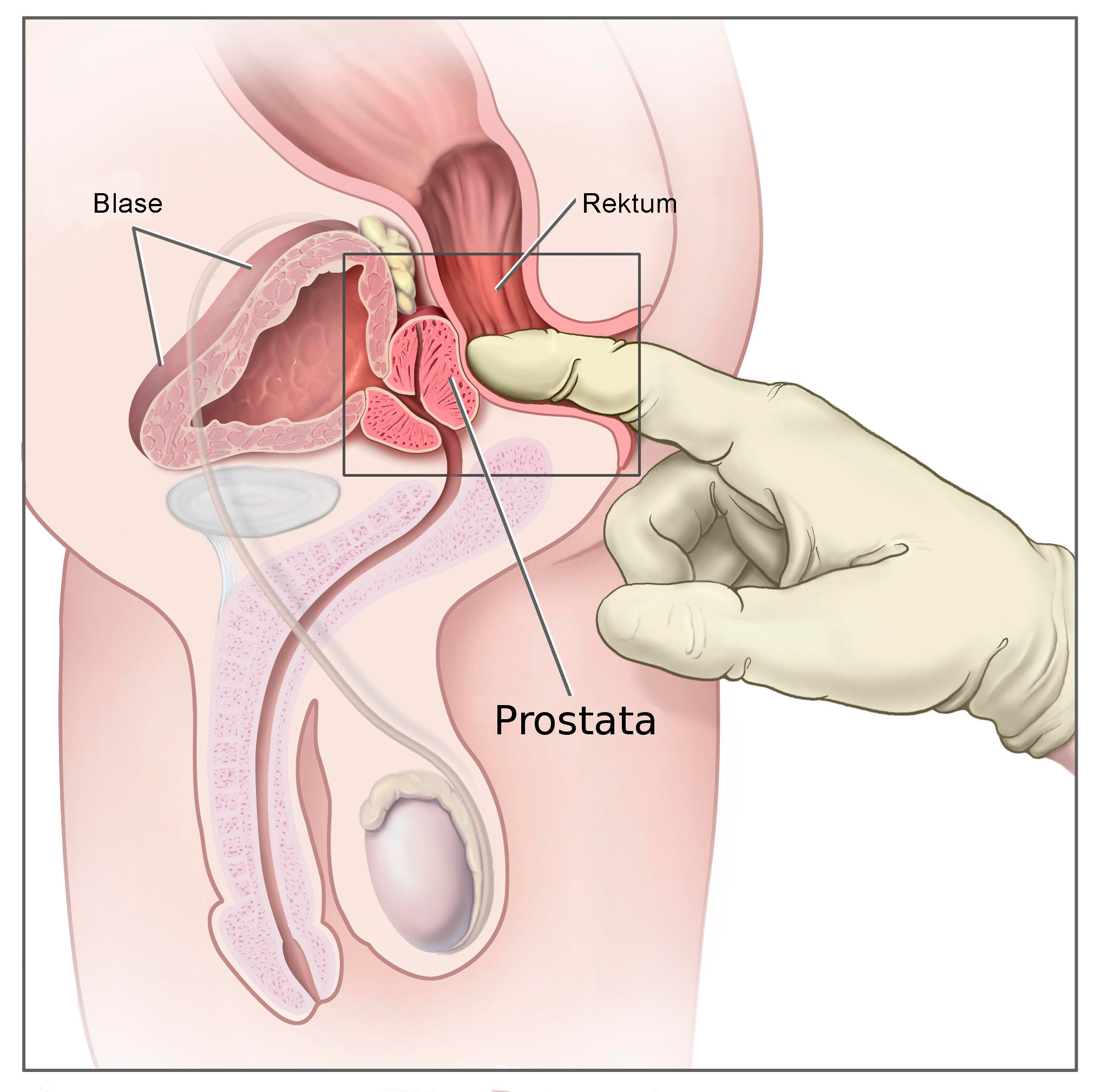 Esame rettale.